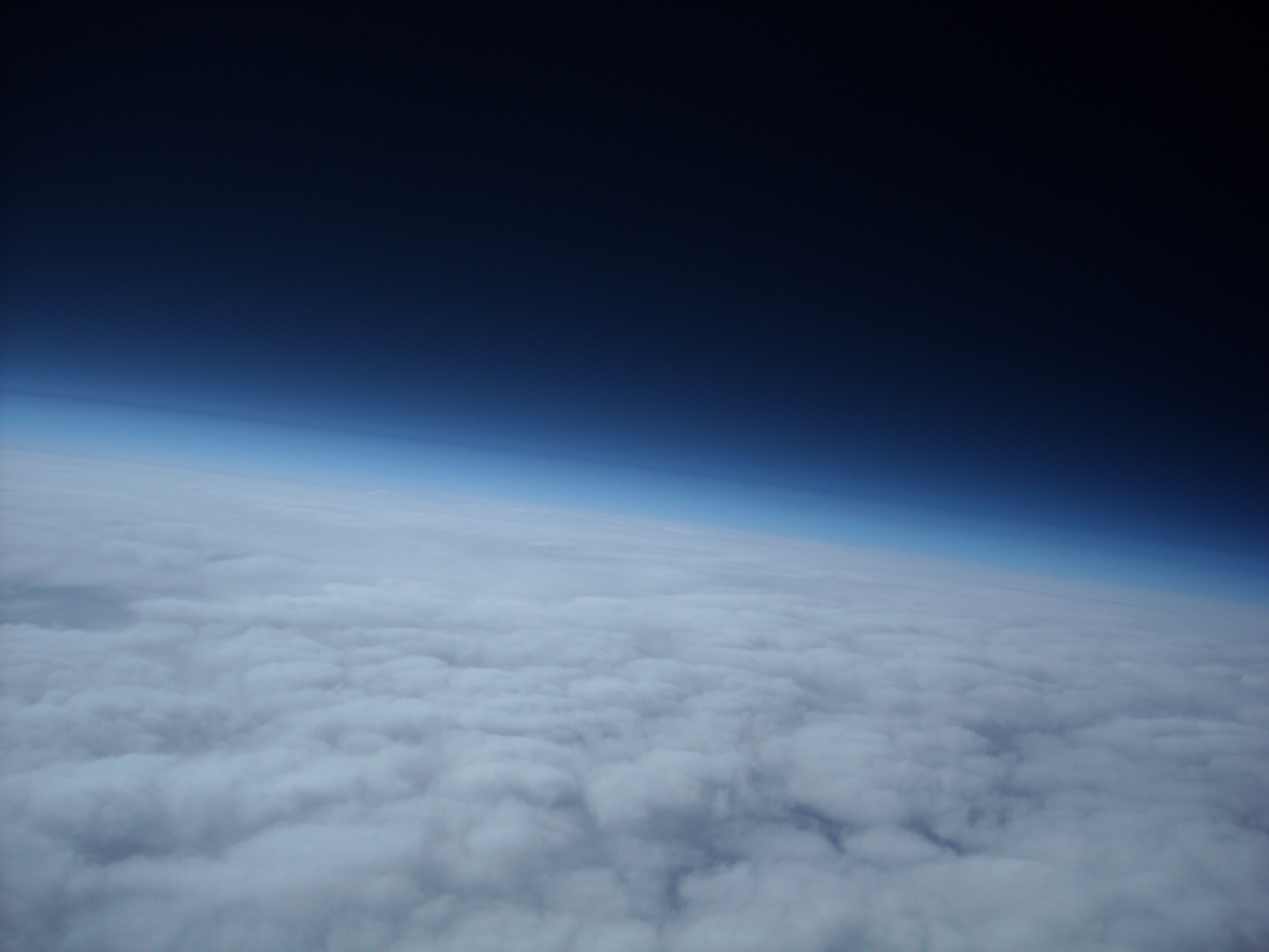 Atmósfera de la tierra.